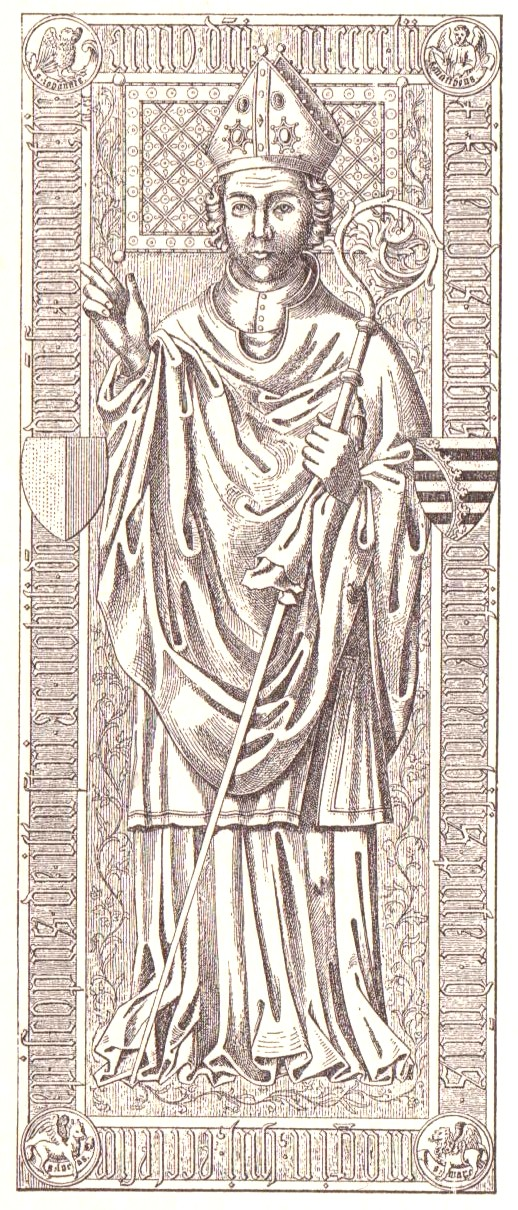 Grabplatte von Magnus von Sachsen-Lauenburg, Bischof von Hildesheim 1424-1452; bis ca. 1789 im Mittelschiff des Hildesheimer Doms, danach entfernt und verschollen